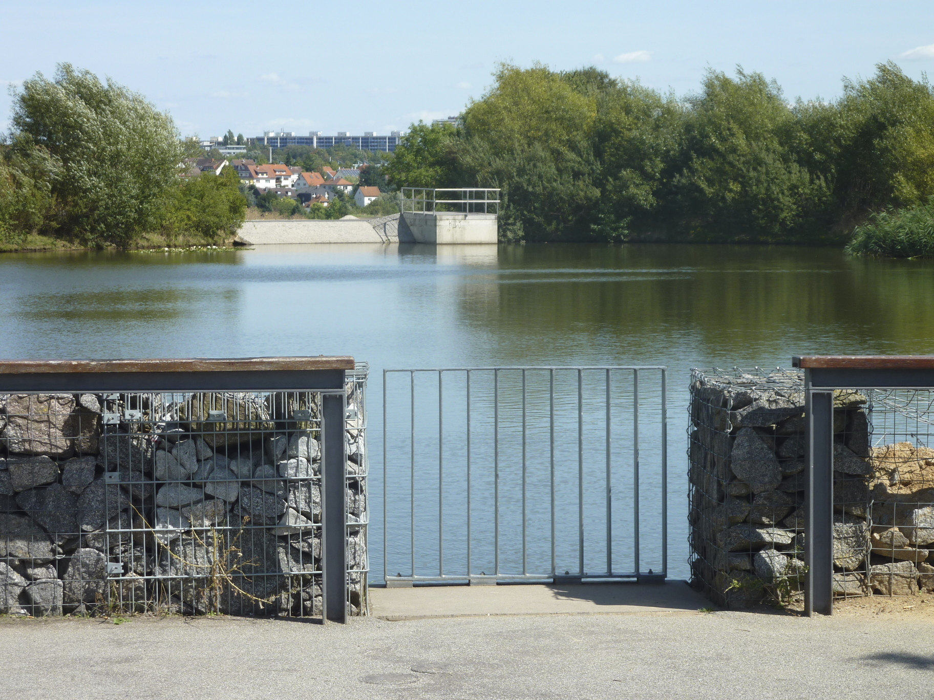 Der Kätcheslachpark ist eine Grünanlage im Stadtteil Kalbach-Riedberg der Stadt Frankfurt am Main. Der Park mit zentralem Teich, Regenwasser-Rückhaltebecken sowie mehreren Zu- und Ablaufgräben wurde von 2006 bis 2007 in einer Mulde der Anhöhe Riedberg angelegt. Sein Hauptzweck ist die Gewässerregulierung der benachbarten, zur selben Zeit neu angelegten Wohnsiedlung. Das Foto zeigt eine Ansicht des Teichs von Südwesten; Aufnahmestandort ist die von Gabionen gesäumte Aussichtsplattform zwischen Teich und Rückhaltebecken. Im Bildhintergrund die Bebauung des Stadtteils Frankfurt-Kalbach.